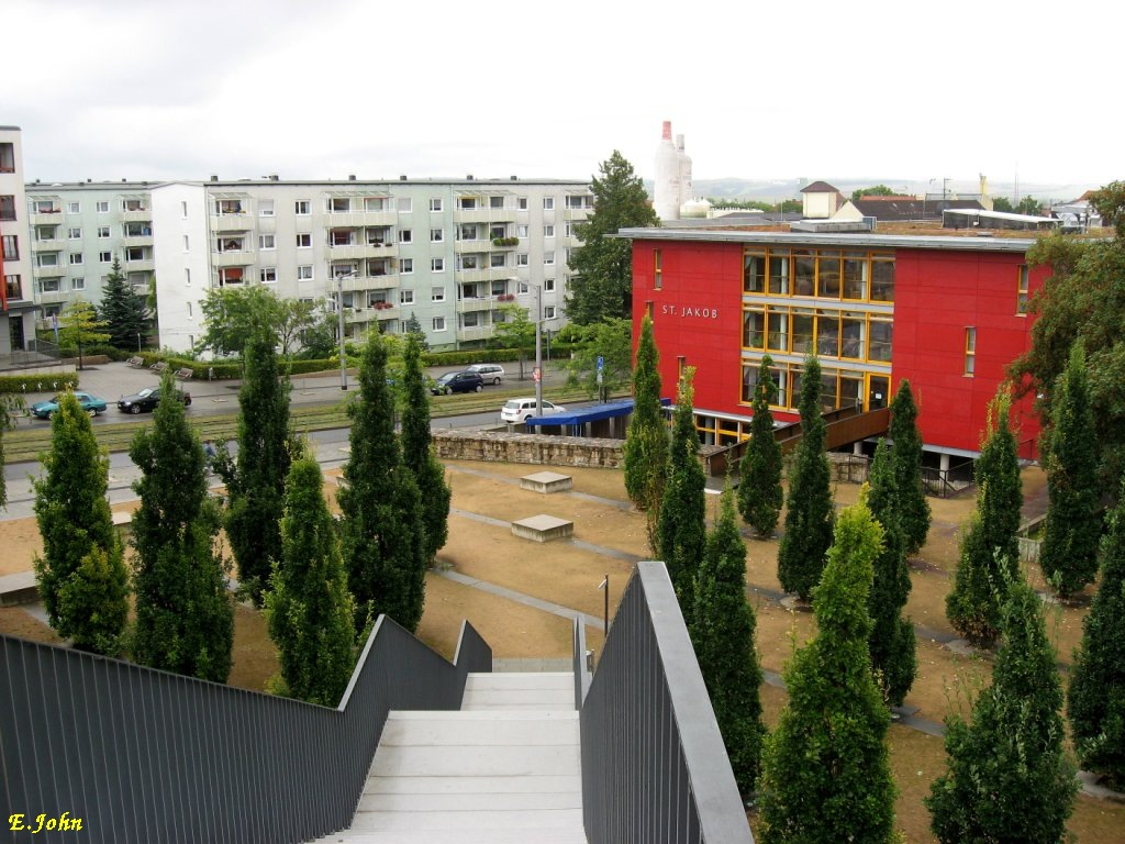 Nordhausen am Harz, Neue Lesserstiege zur Rautenstraße und St. Jakob - Heim